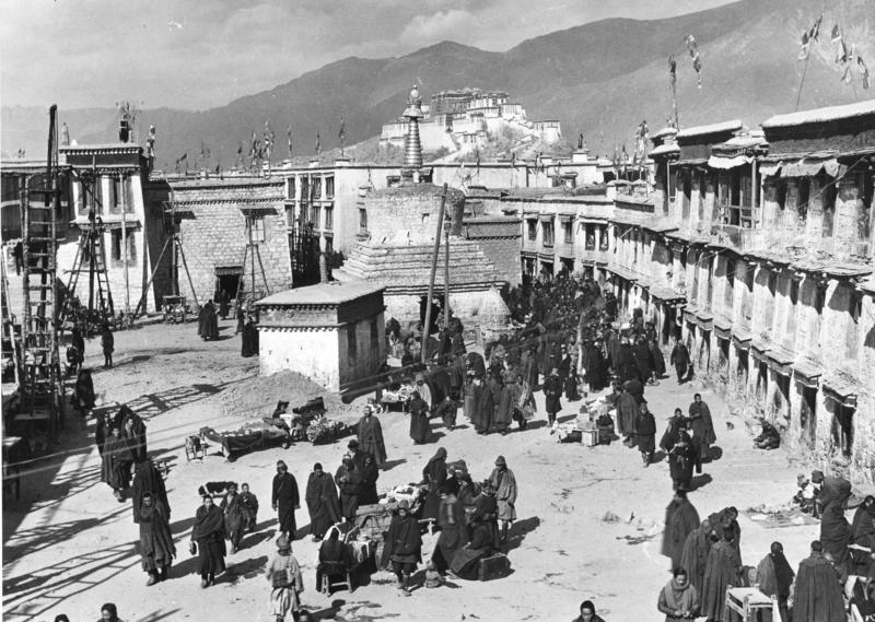 Tibetexpedition, Marktplatz in Lhasa Lhasa-Neujahr, Marktplatz